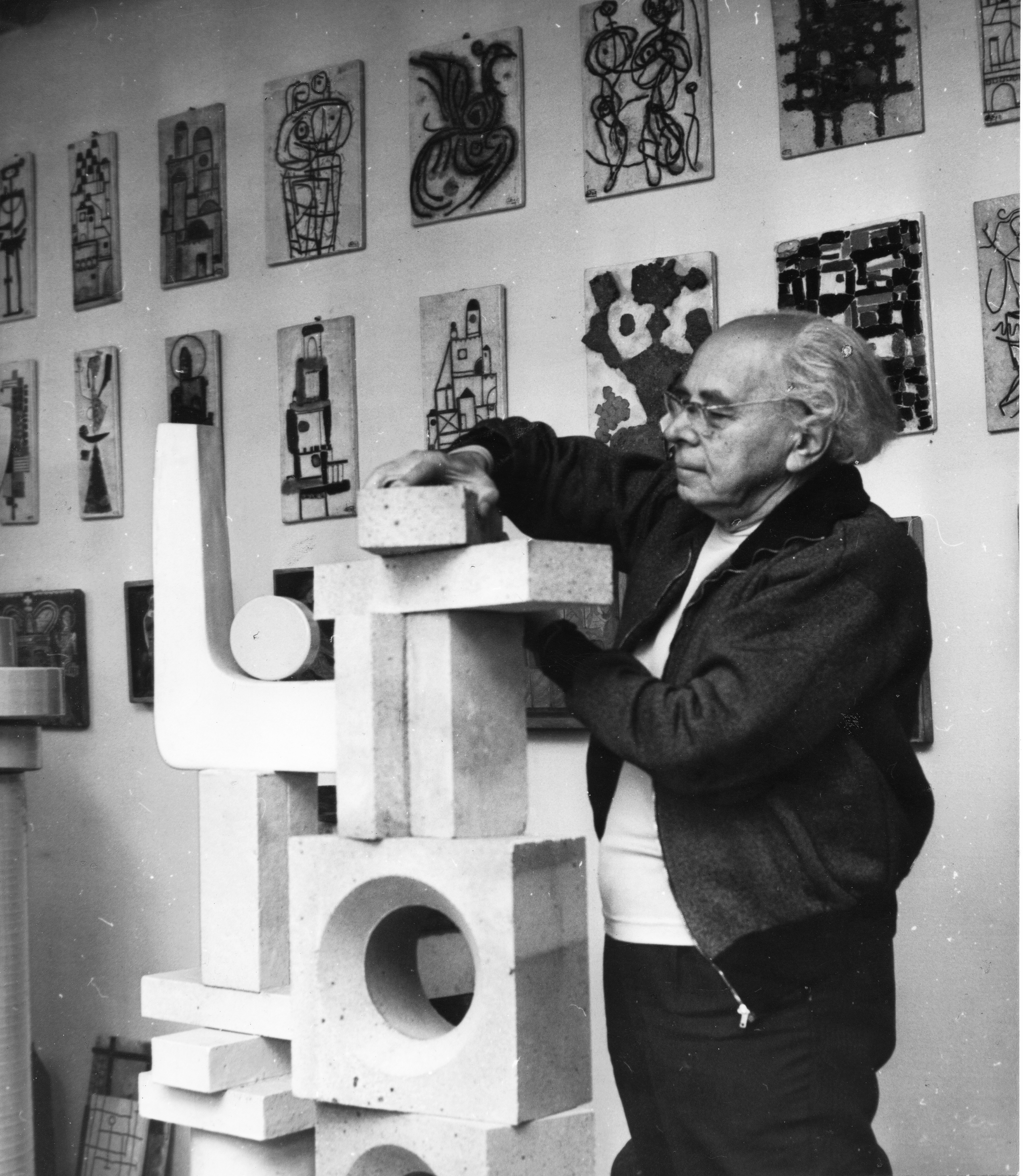 Gádor István keramikus. Location: Hungary Tags: sculpture Title: Gádor István keramikus.